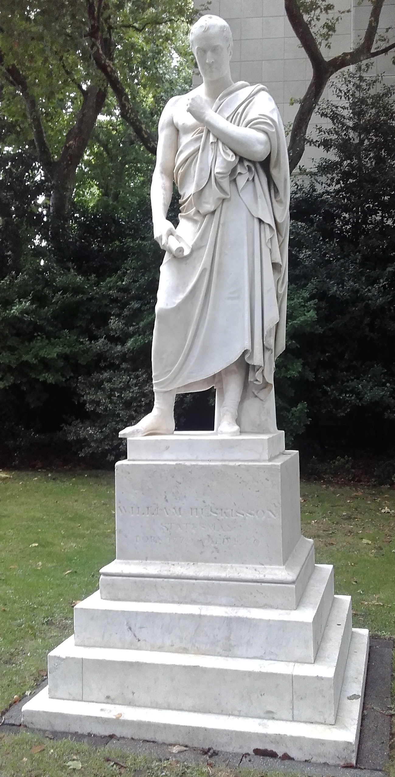 William Huskisson, статуя в Лондоне